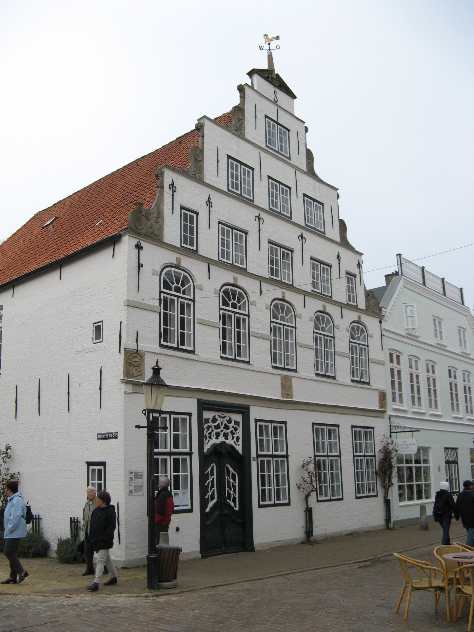 House in Friedrichstadt (das Paludanushaus oder Paludanushuset) Author: Dirk Ingo Franke